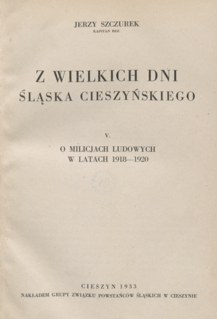 Jerzy Szczurek okładka książki